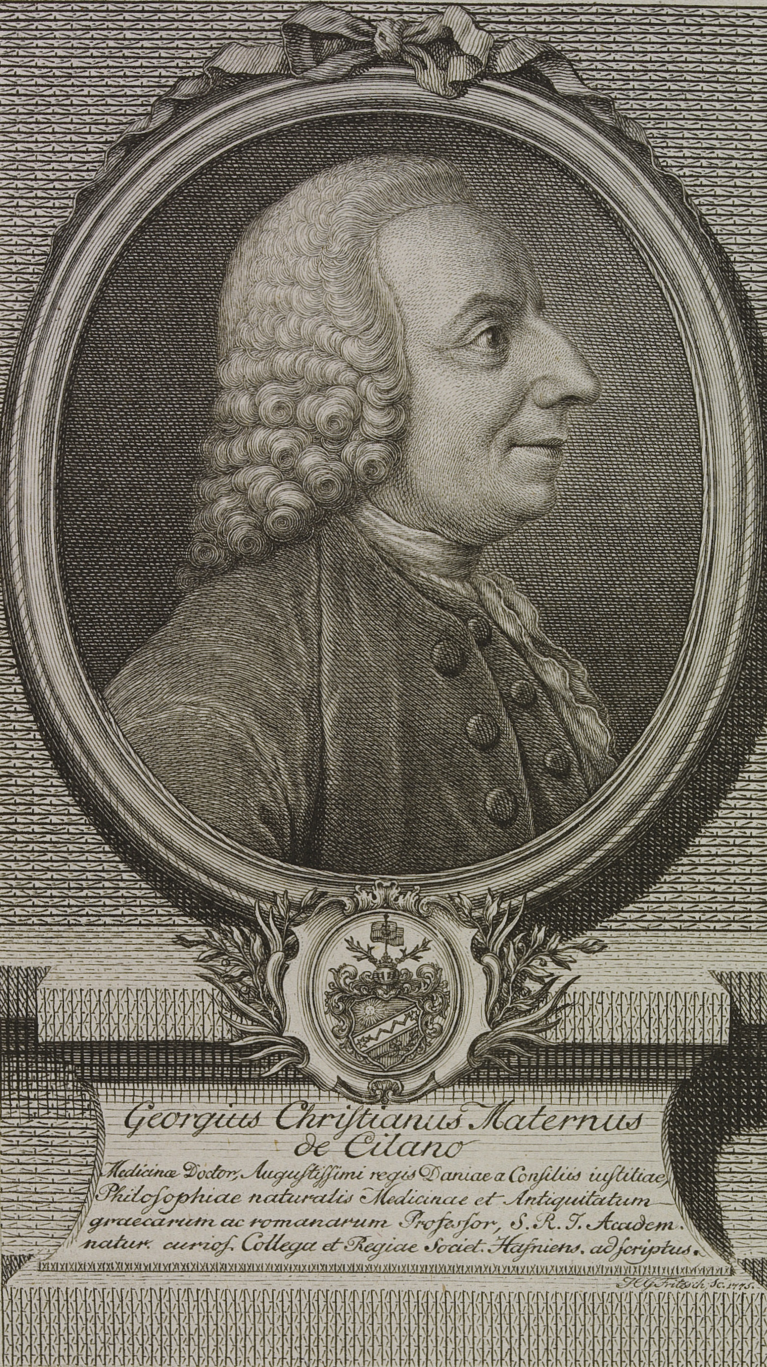 Bildnis von Georg Christian Maternus von Cilano